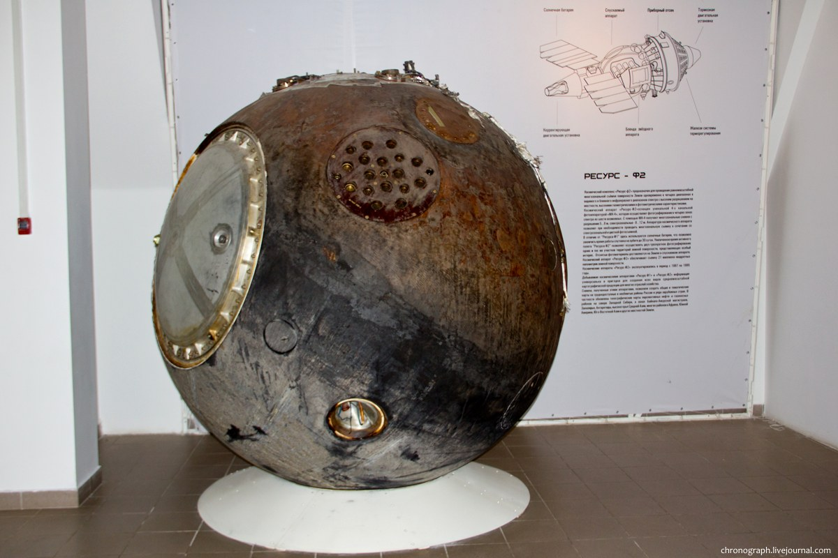 Космический комплекс "РЕСУРС- Ф2" предназначенный для равномасштабной многозональной съемки поверхности земли одновременно в четырех диапазонах с высоким разрешением.